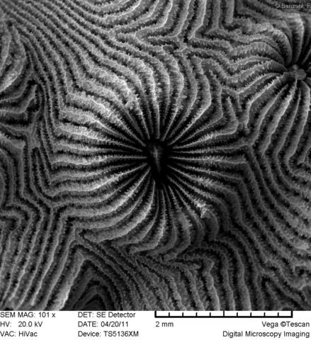 Pavona maldivensis, vista microscópica del coralito sobresaliendo del corallum